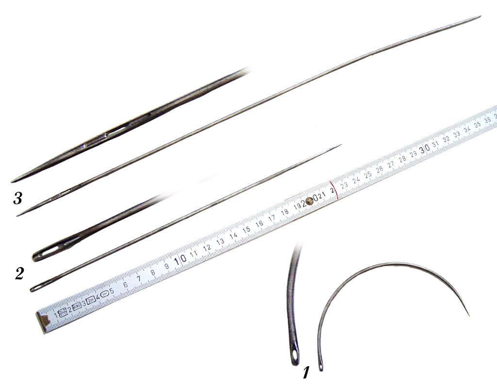 carlet: 1. Carrelet courbe 2. Carrelet droit à une pointe 3. Carrelet droit à une pointe